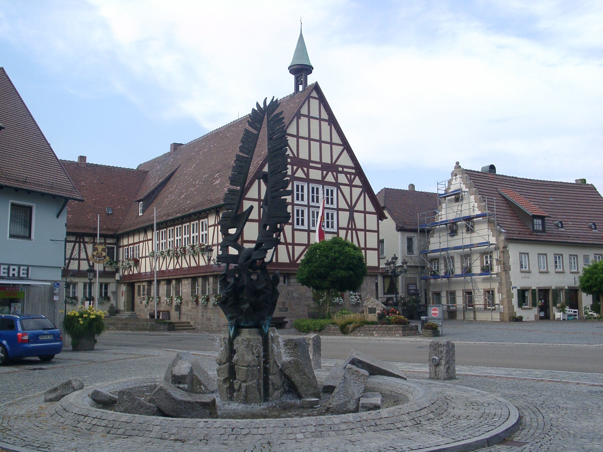 Waldenburg (Württemberg) Ortskern